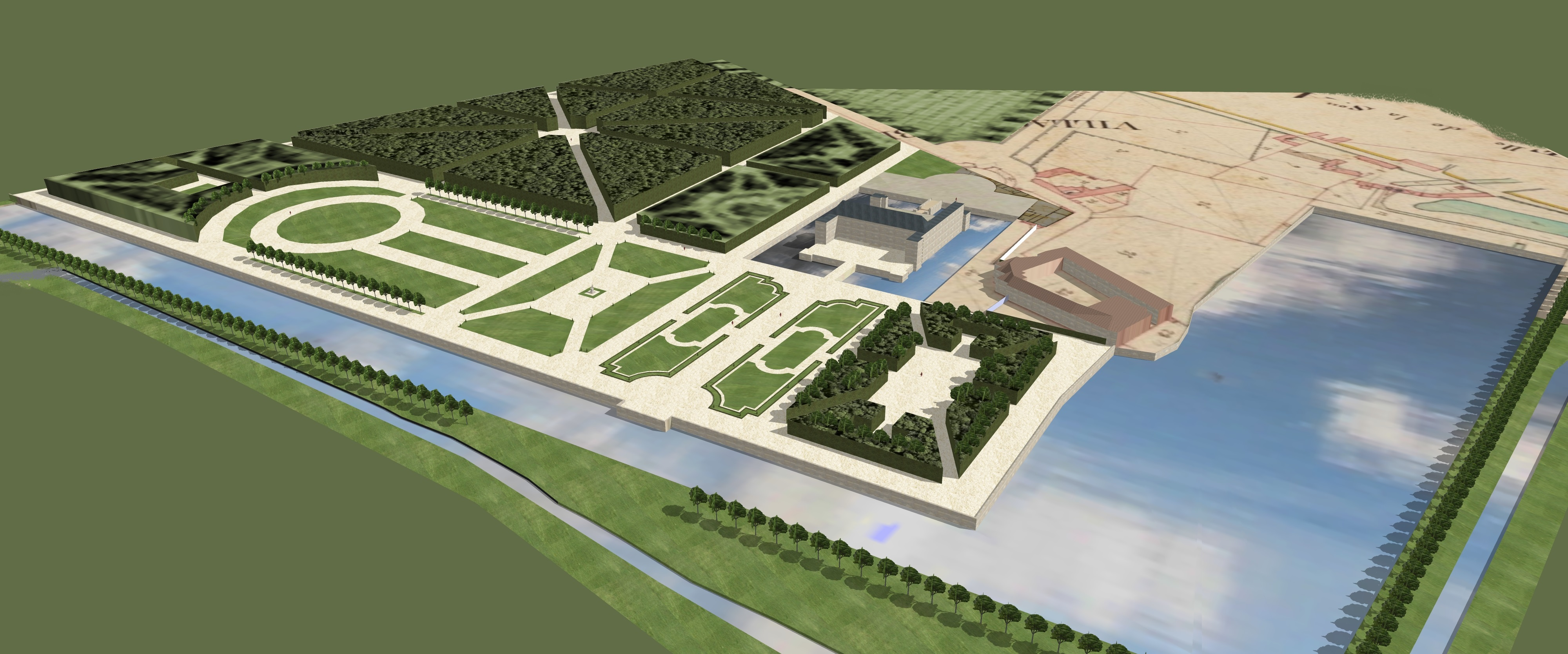 restitution du domaine du Blanc Mesnil propriété des Lamoignon